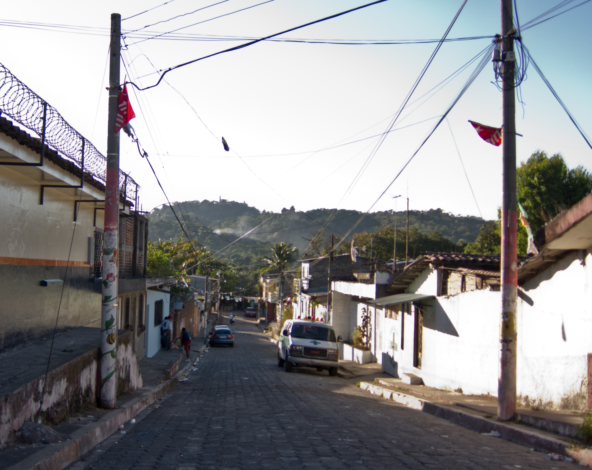 Calle en San Martín, Dept de San Salvador, El Salvador